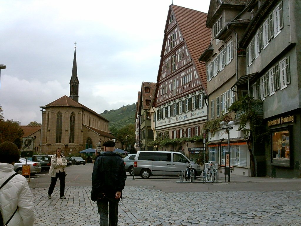 Esslingen, Münster St. Paul und Kielmeyerhaus, selbst fotografiert, 2005